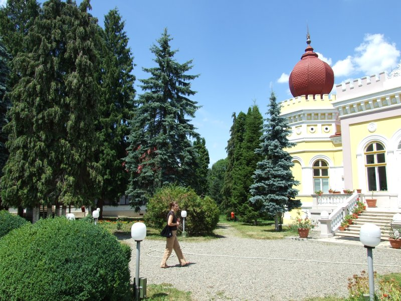 Parcul Dendrologic, Arcalia, Bistrița-Năsăud, 2007.